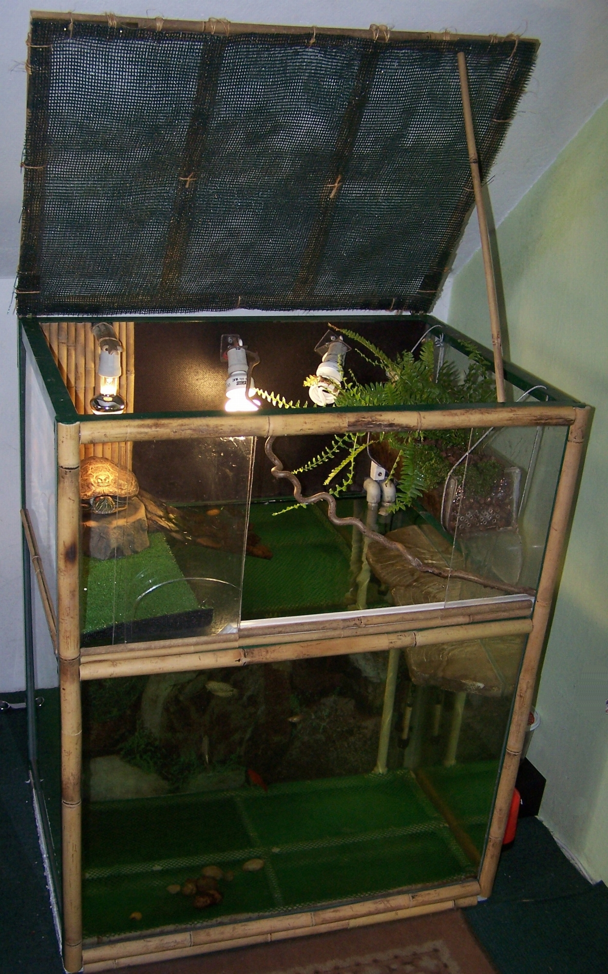 Aquaterrarium